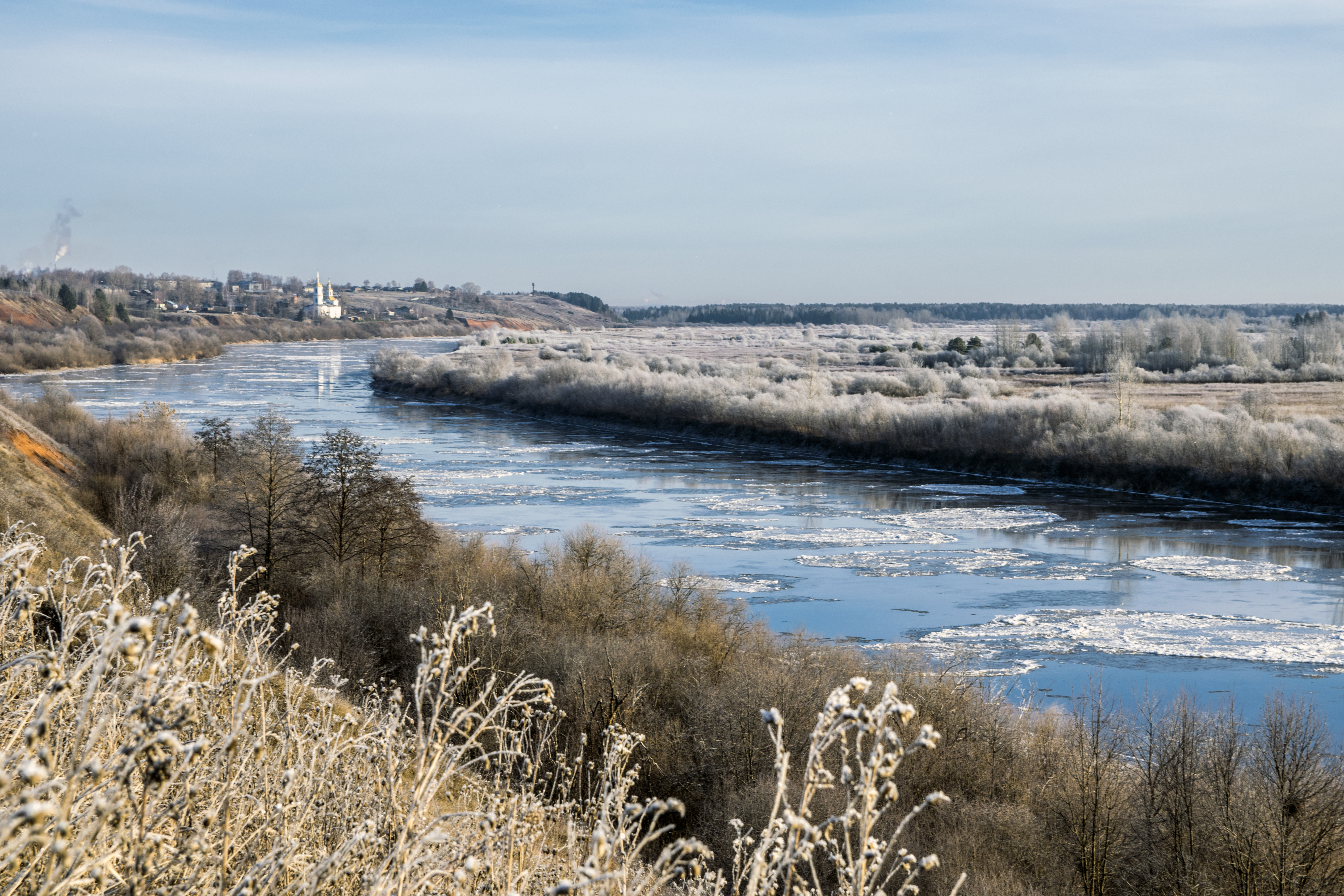 Река Молома во время ледостава у села Юрьево Котельничского района Кировской области This image has been uploaded for Wikivoyage travel guide on Кировская область